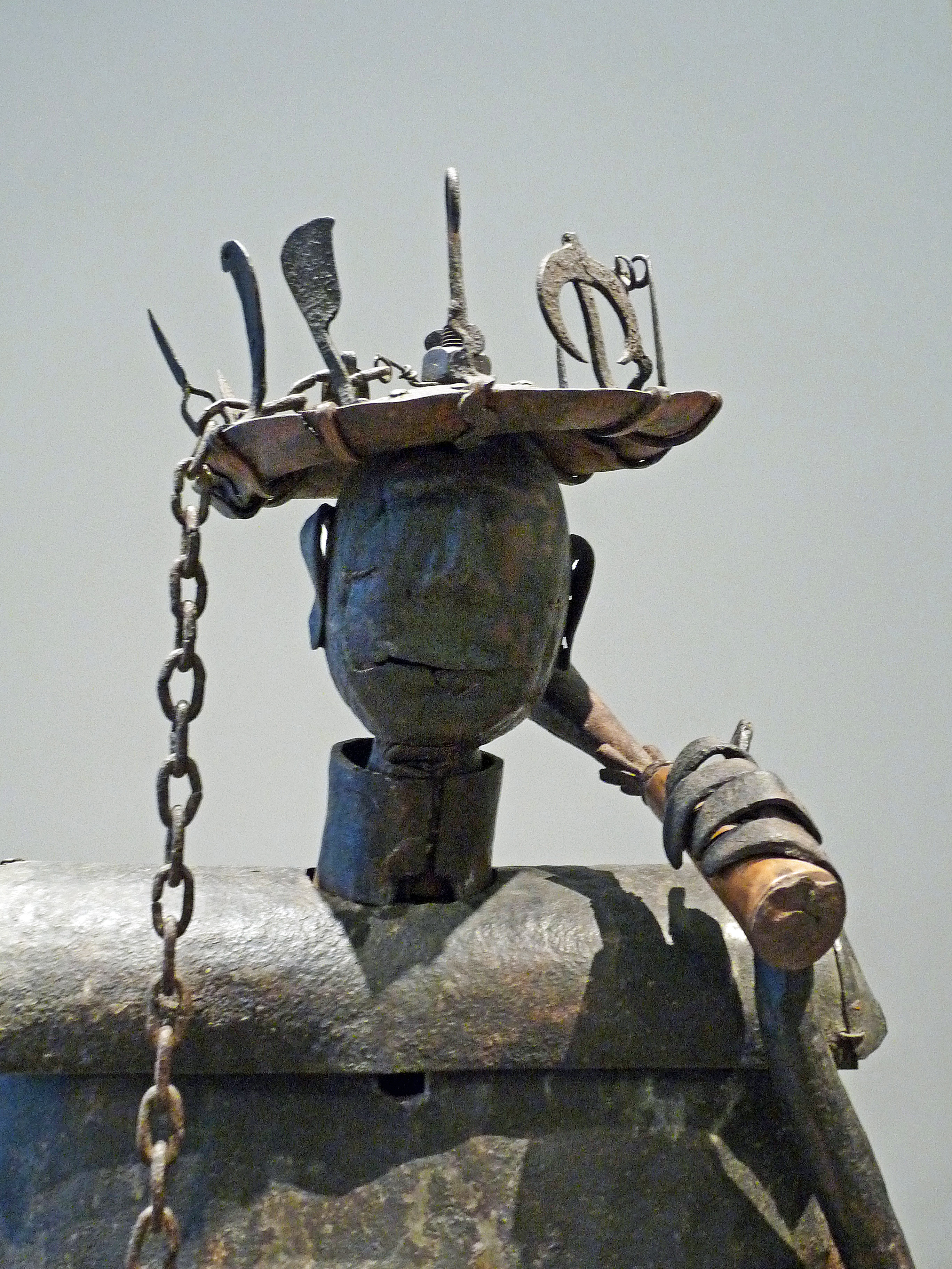 Sculpture fon en fer attribuée à Akati Ekplékendo. République du Bénin. Avant 1858. Statue dédiée à Gou, divinité du fer et de la guerre. Pavillon des Sessions, Louvre, Paris